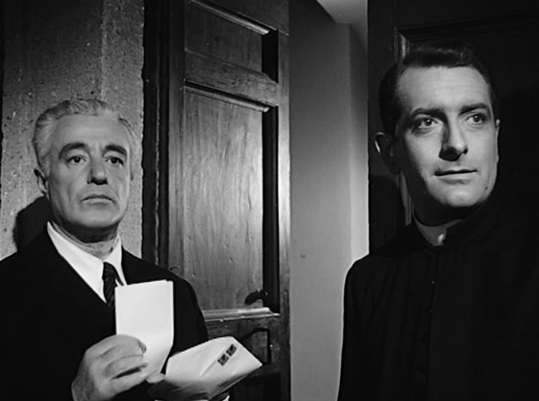 Scena dal film Il nemico di mia moglie (1959)